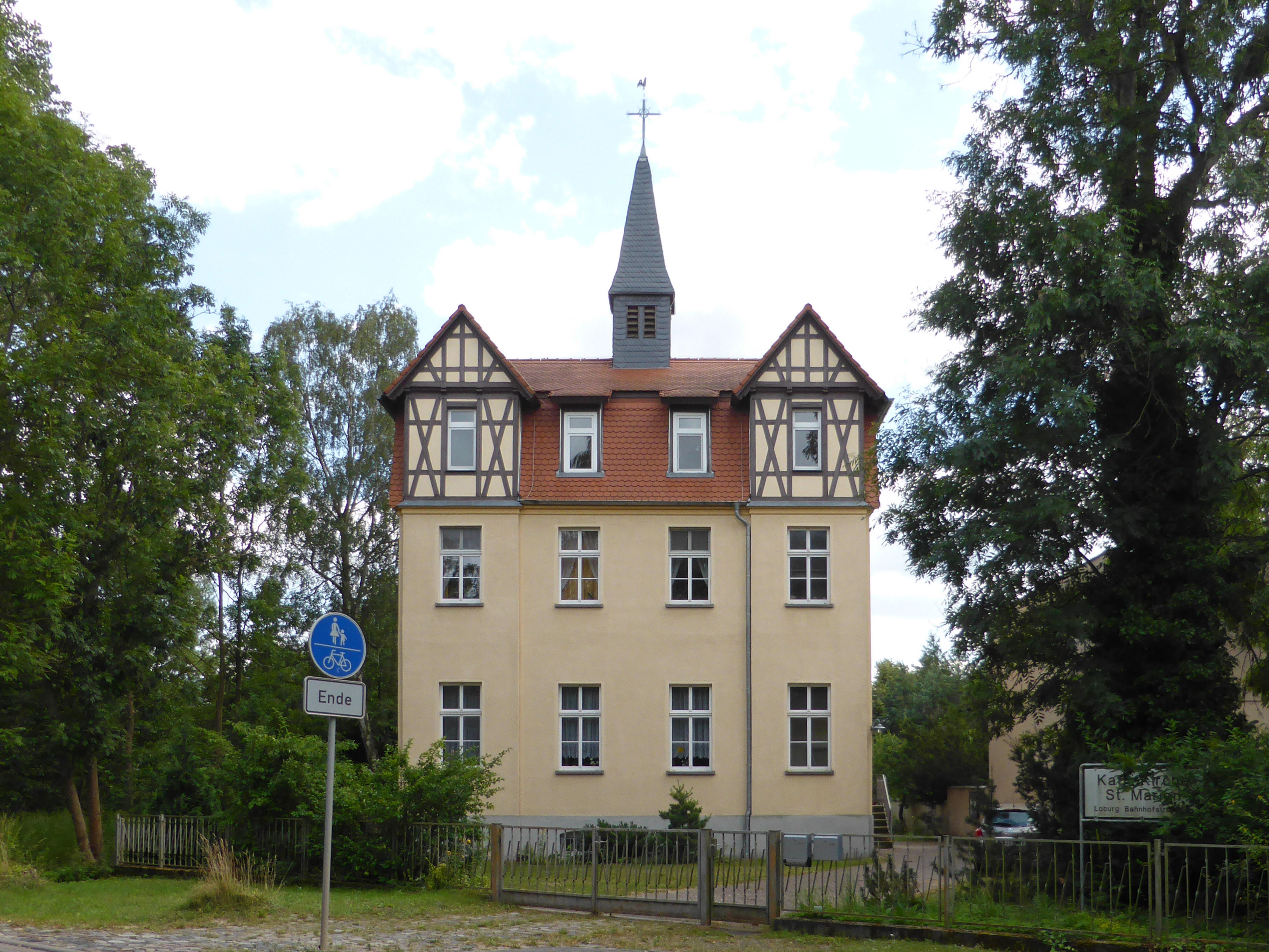 Katholische Kirche in Lobirg.